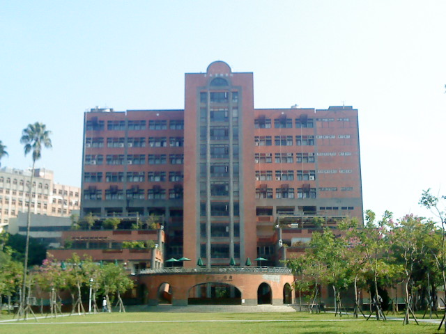 中文（台灣）: 國立臺灣大學管理學院一號館。